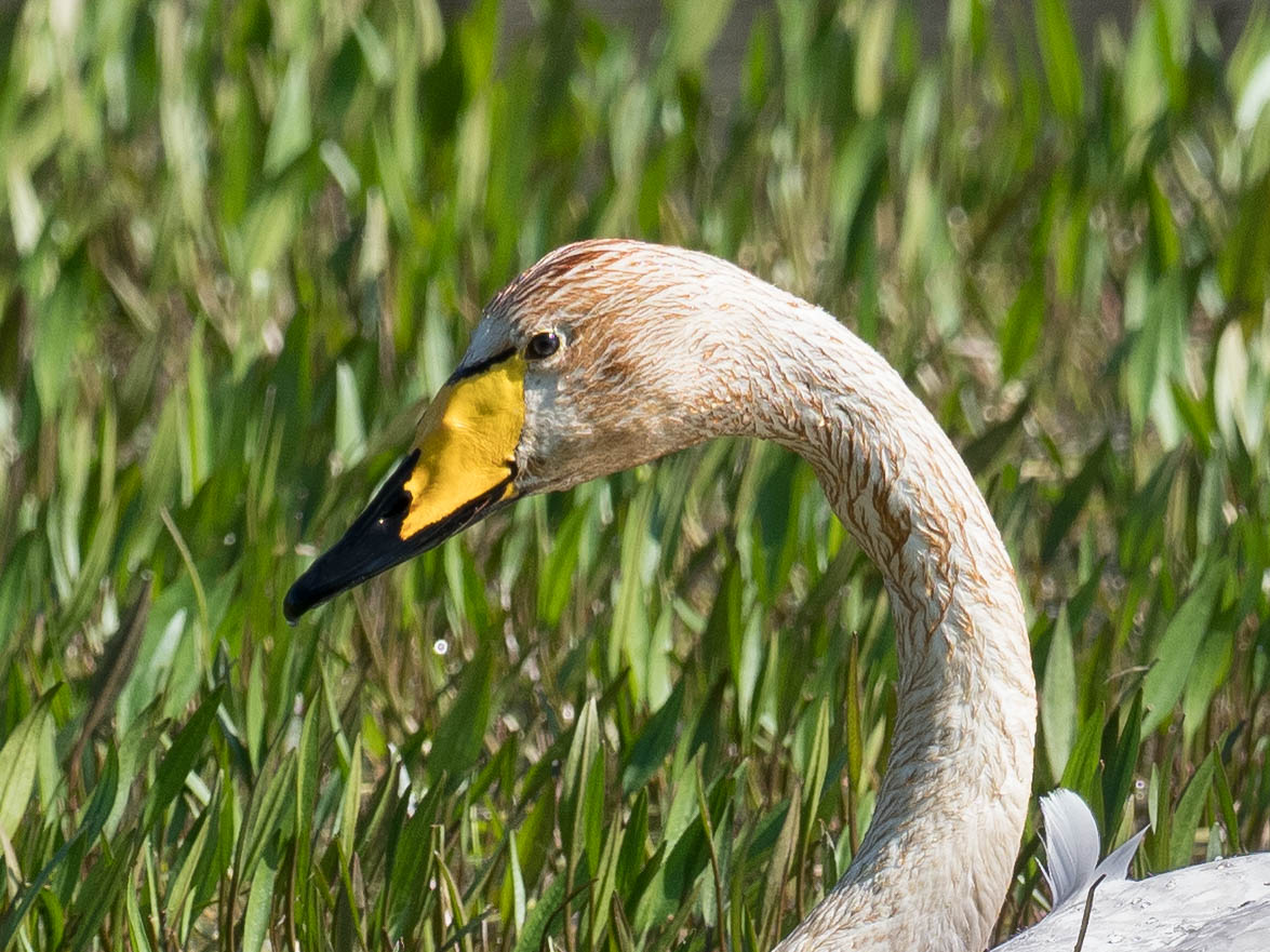 Cygnus cygnus